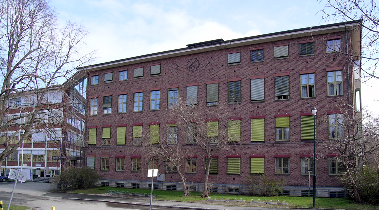 Høgskolen i Sør-Trøndelag, avd. for teknologi (tidl. Trondheim Ingeniørhøyskole), Gunnerus gate, Trondheim. Arkitekt: Herman Krag.